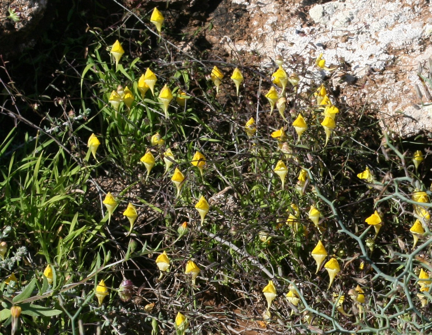 Taken near Montaña Roja, Playa Blanca, Lanzarote.